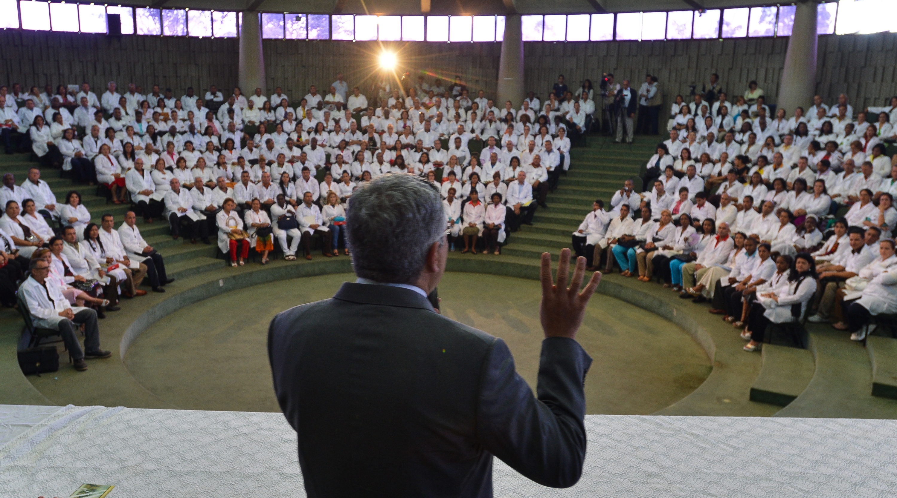 Brasília – O ministro da Saúde, Alexandre Padilha, participa da aula inaugural do módulo de acolhimento e avaliação dos profissionais cubanos para a segunda etapa do Programa Mais Médicos. Durante três semanas, os médicos terão aulas sobre saúde pública brasileira e Língua Portuguesa. A aprovação nesta etapa é condição para receber o registro profissional provisório para atuação no programa. Os médicos devem começar suas atividades nos municípios em dezembro.